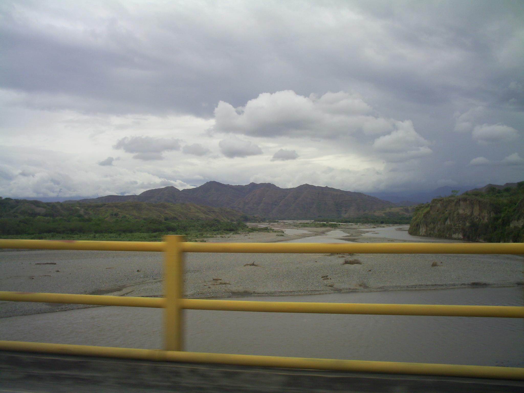 Puente de Galíndez, hacia el Sur se va para Mercaderes y hacia el Norte se va para el Patía